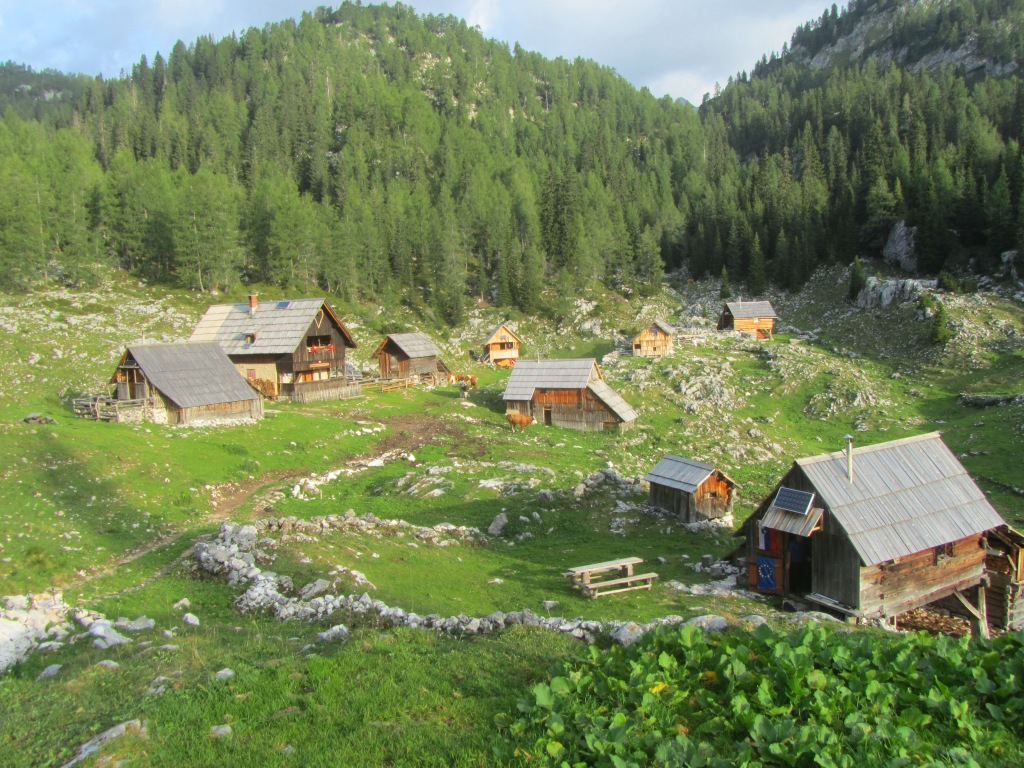 Planina Dedno polje, Bohinjske planine